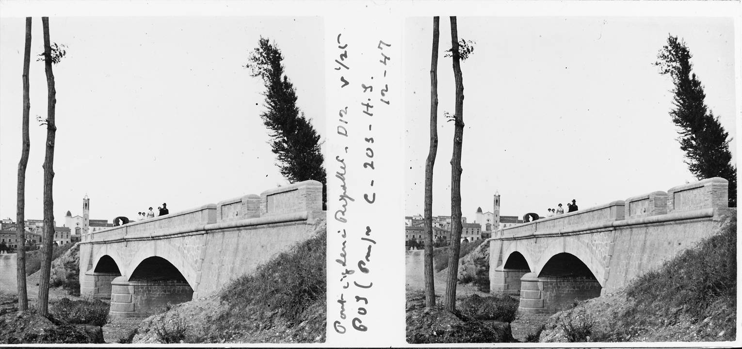 Pont i església de Ripollet. Josep Salvany i Blanch (1912)